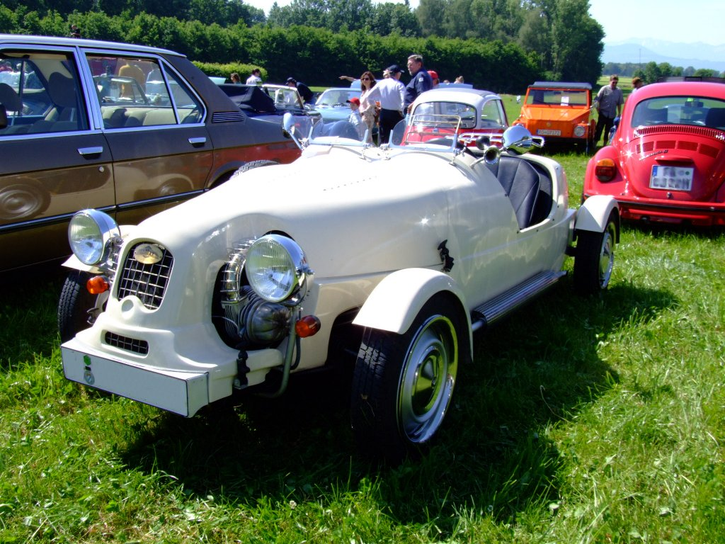 Lomax 1997 Baujahr: 1997 29 PS Fahrgestell: Ente